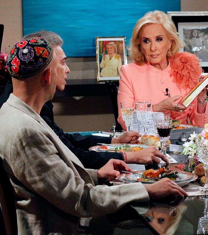 Mirtha Legrand en Almorzando con Mirtha Legrand junto a Jairo y Sergio Bergman